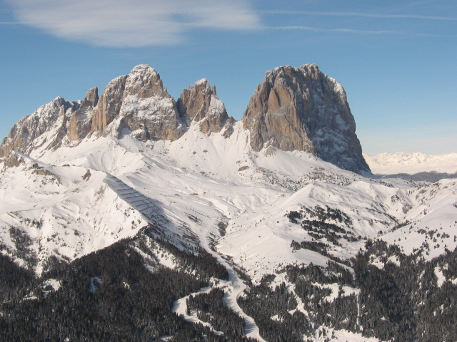 נוף המצוקים במרחב הסקי של סלה רונדה